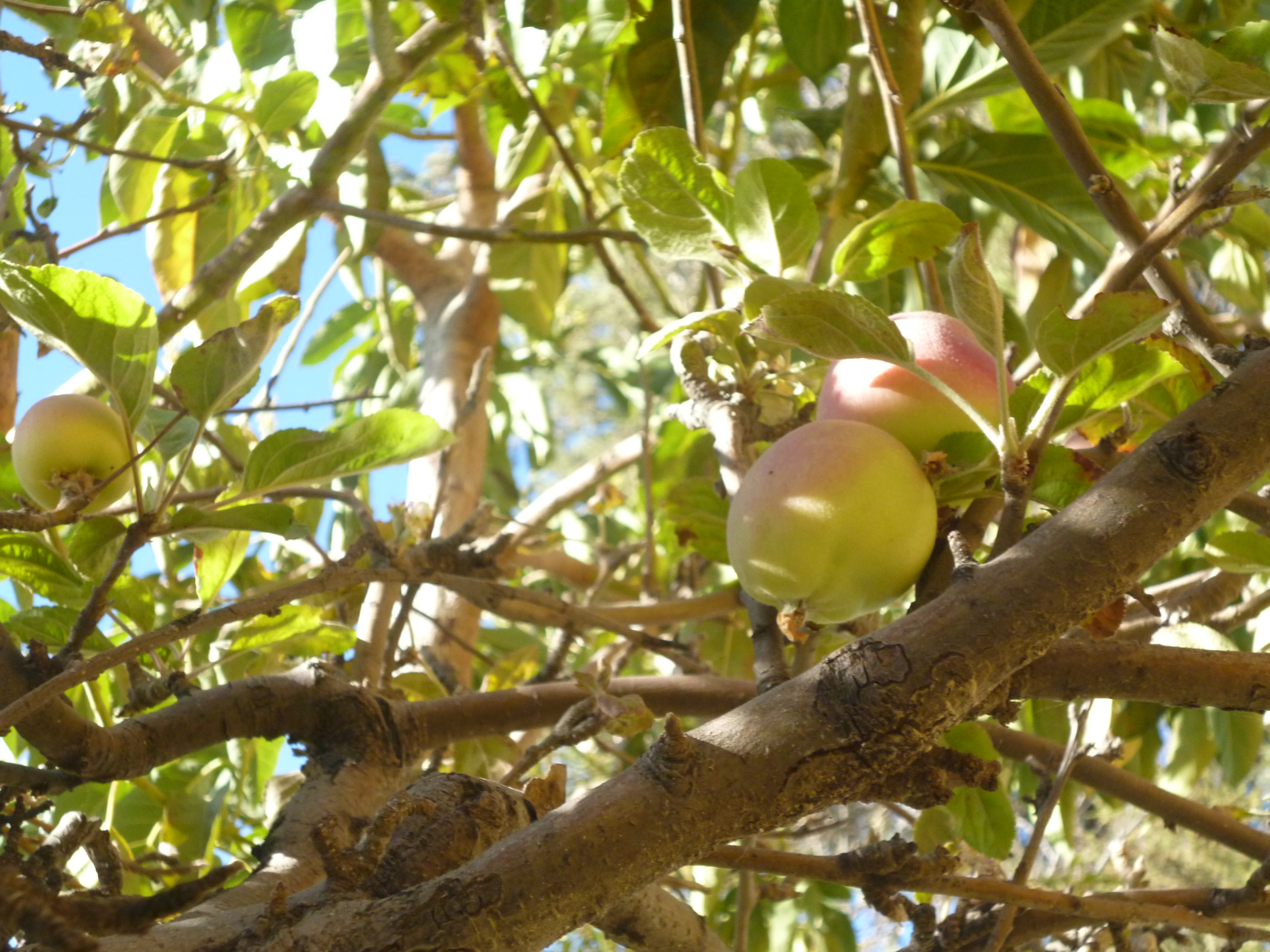 Fruto de Prunus persica colgando en el Arból, tomado en Arequipa, Perú.